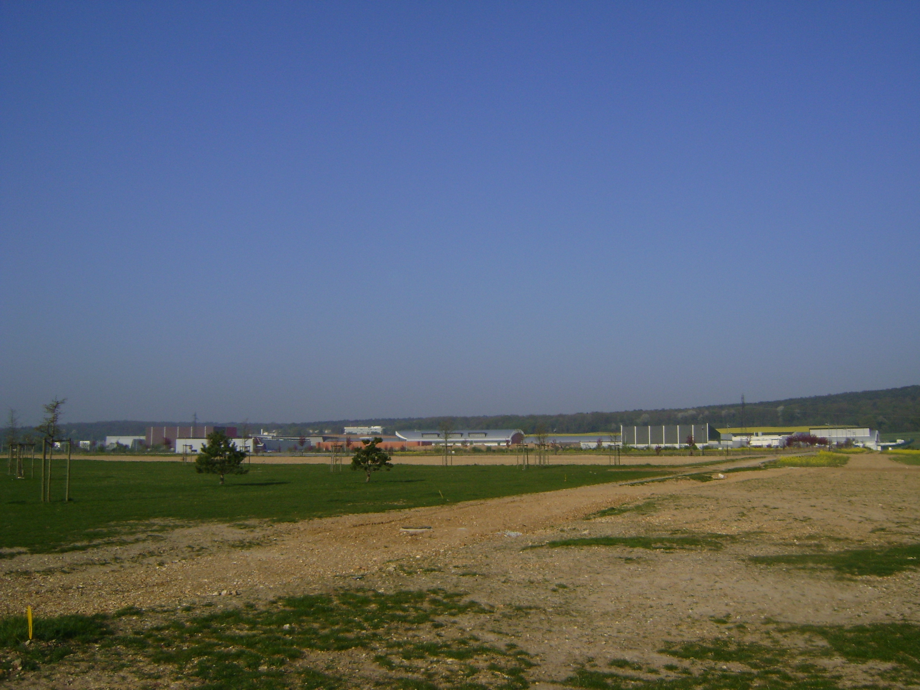 Bassin des Carènes, Val de Reuil en France